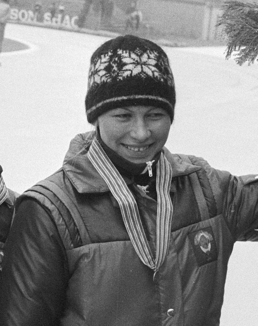 Natalya Glebova. Europese kampioenschappen schaatsen dames allround in Heerenveen.